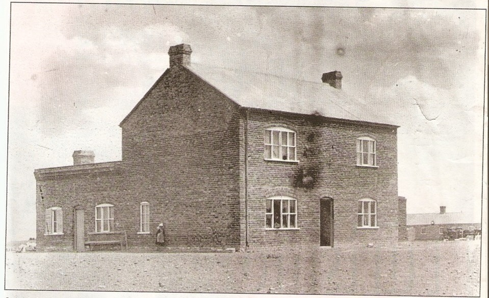 Esta fue la Casa de Lewis Jones (la tercera), ubicada en la esquina de Calle Italia y Pasaje Salta en Trelew.- Antes había construido su primera casa en su chacra cercana a Rawson y más tarde la casona conocida como "Plas Hedd" (lugar de paz). En esta tercera casa funcionó una escuela secundaria con internado para señoritas, creada por su hija en 1890, también el periódico "Y Drafod y transitoriamente el Banco de la Nación, cuando la inundaciòn de Rawson en 1899, obligó a su traslado a Trelew para quedarse definitivamente por la importancia que iba adquiriendo el pueblo al ser punta de rieles.